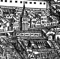 La chiesa di San Domenico nella mappa di Jacopo de' Barbari. Licensing Categoria:Pianta di Venezia di Jacopo de' Barbari